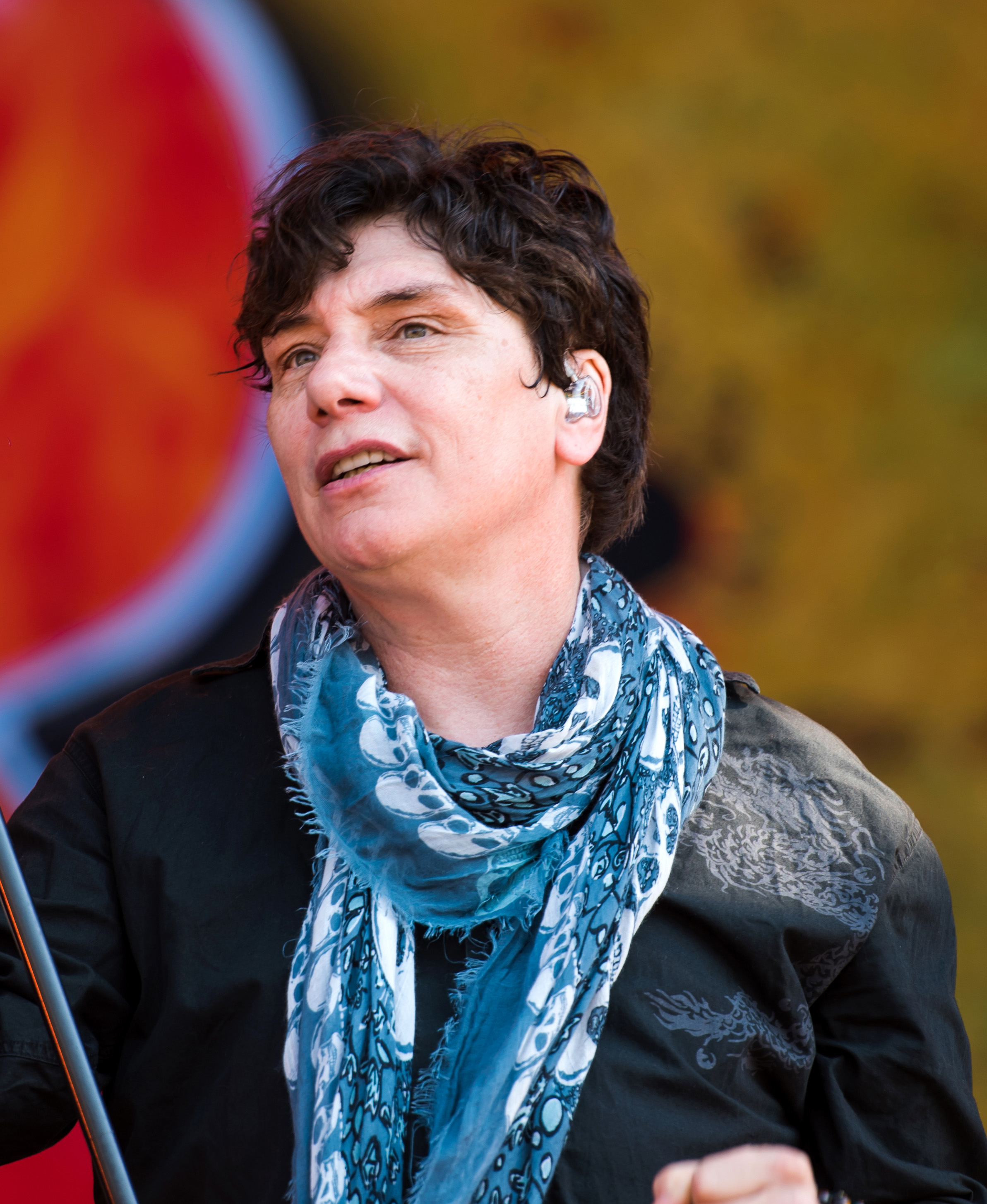 Mr. Big beim Wacken Open Air 2018